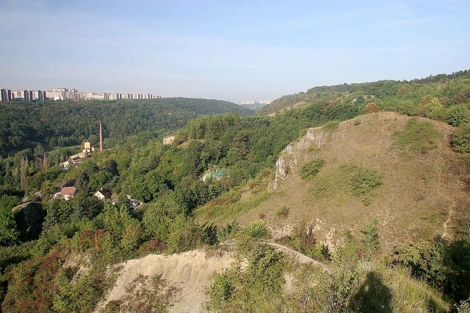 Natural Reserve Prokopské údolí, Praha, Czech Republic Pohled do údolí směrek k sídlišti Barrandov autor: Prazak date: 16. 8. 2006